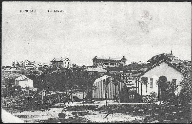 青岛教会山